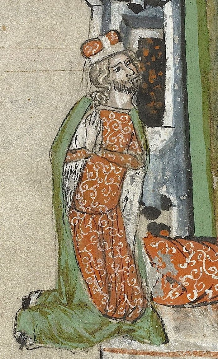 Ludvík I. Lehnicko-Břežský